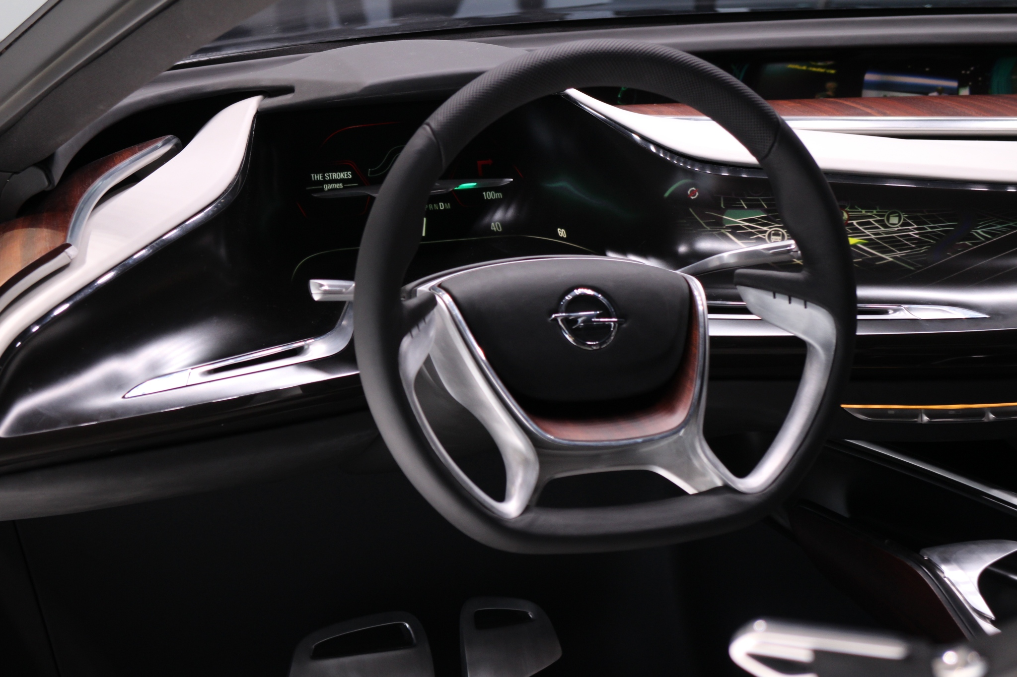 IAA 2013